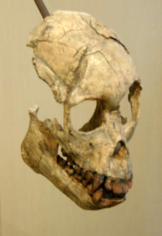 Proconsul heseloni skull